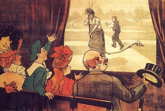 Del av filmaffisch för bröderna Lumières film L’arroseur arrosé (svensk titel Trädgårdsmästarens hämnd)